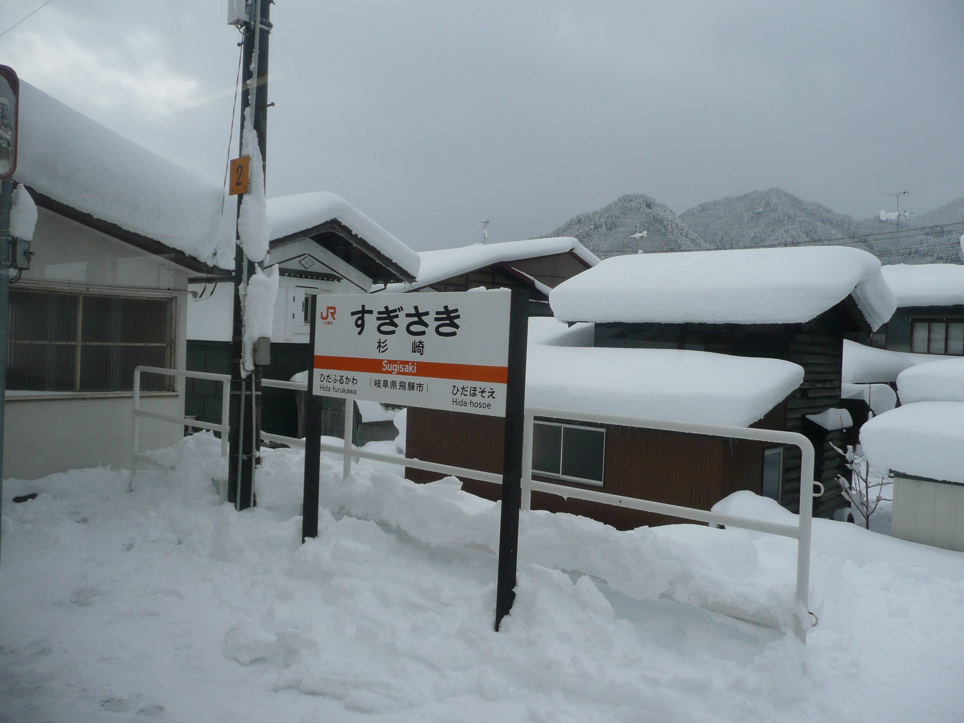 高山本線杉崎駅の看板。